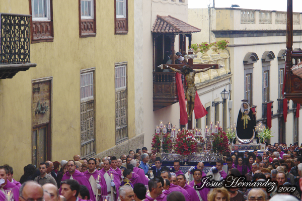 Procesión de El Mandato por la Carrera del escultor Fernando Estévez, en la Villa de La Orotava.